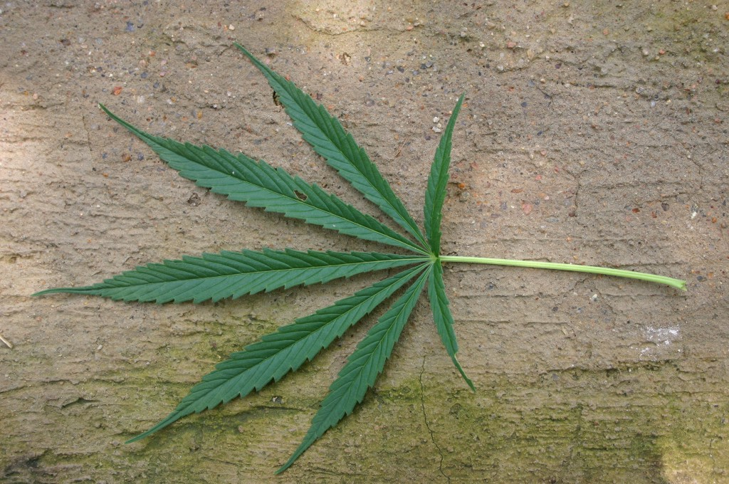 Cannabis sativa